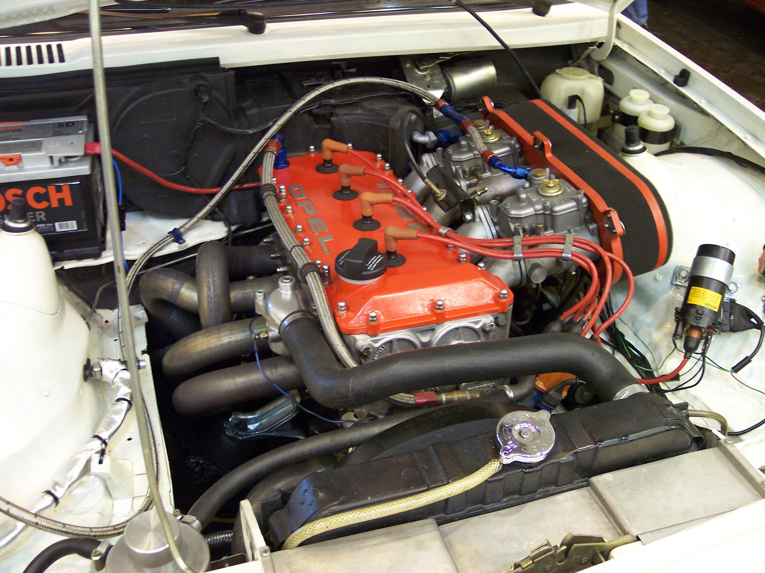 Opel Manta 400i engine